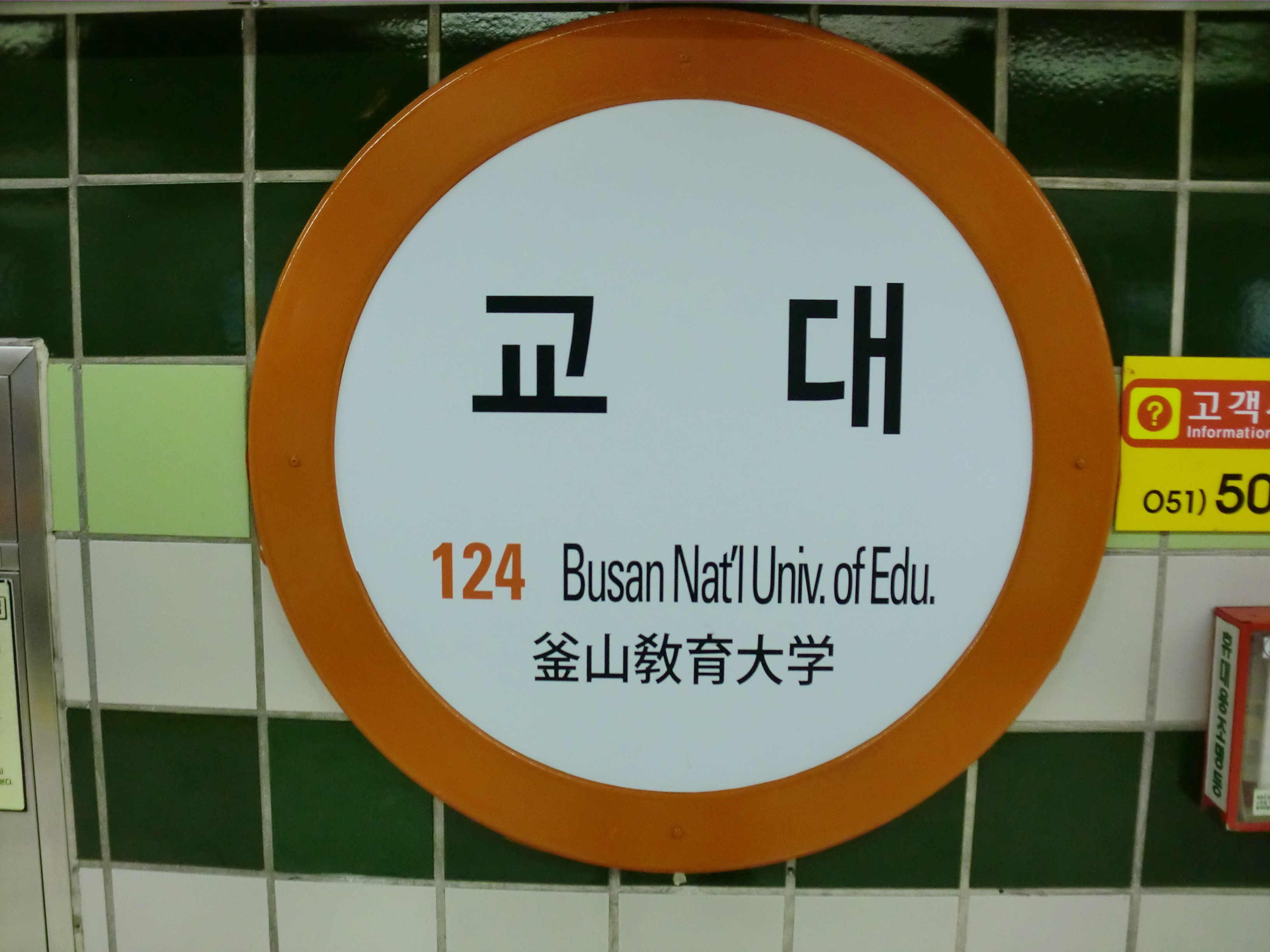 부산도시철도 1호선 교대역의 역명판